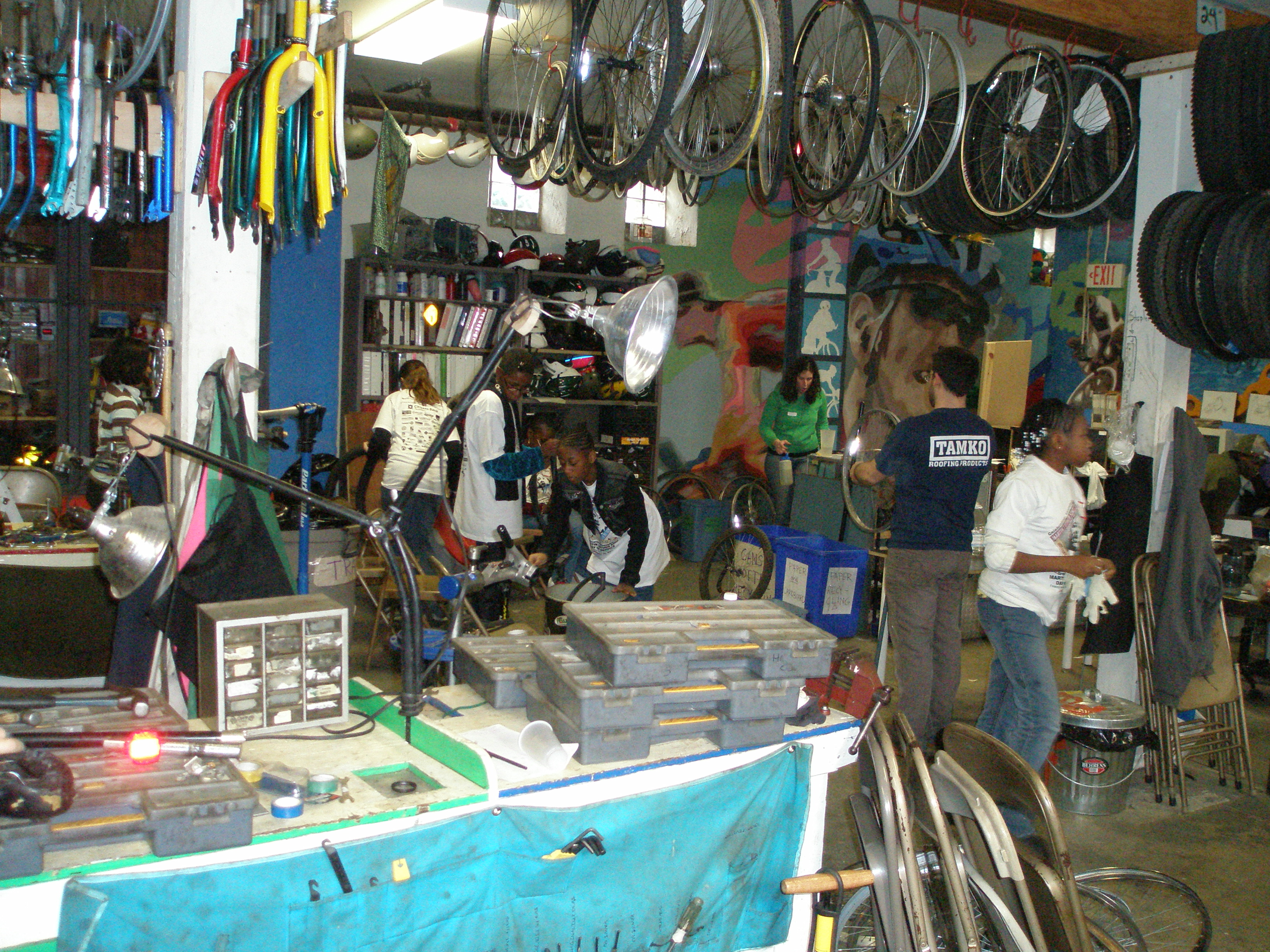 Neighborhood Bike Works